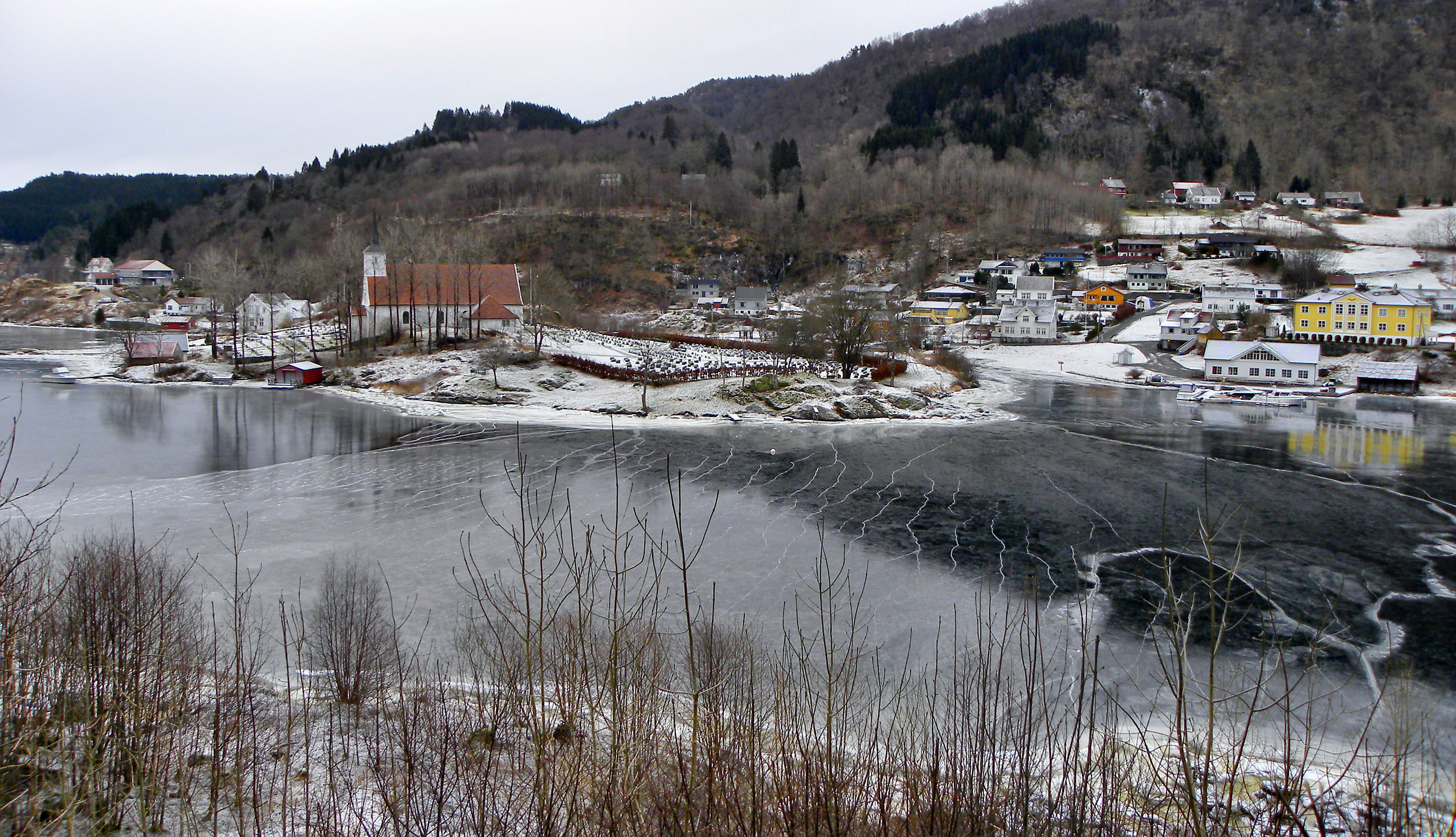 Hosanger kirkested ved Mjøsvågen i vinterdrakt 16. jan. 2013.